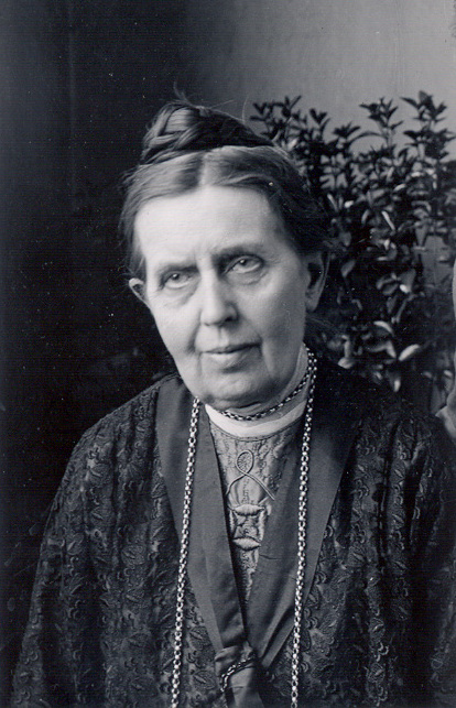 Das Foto stellt die Malerin Eugenie Dillmann dar.